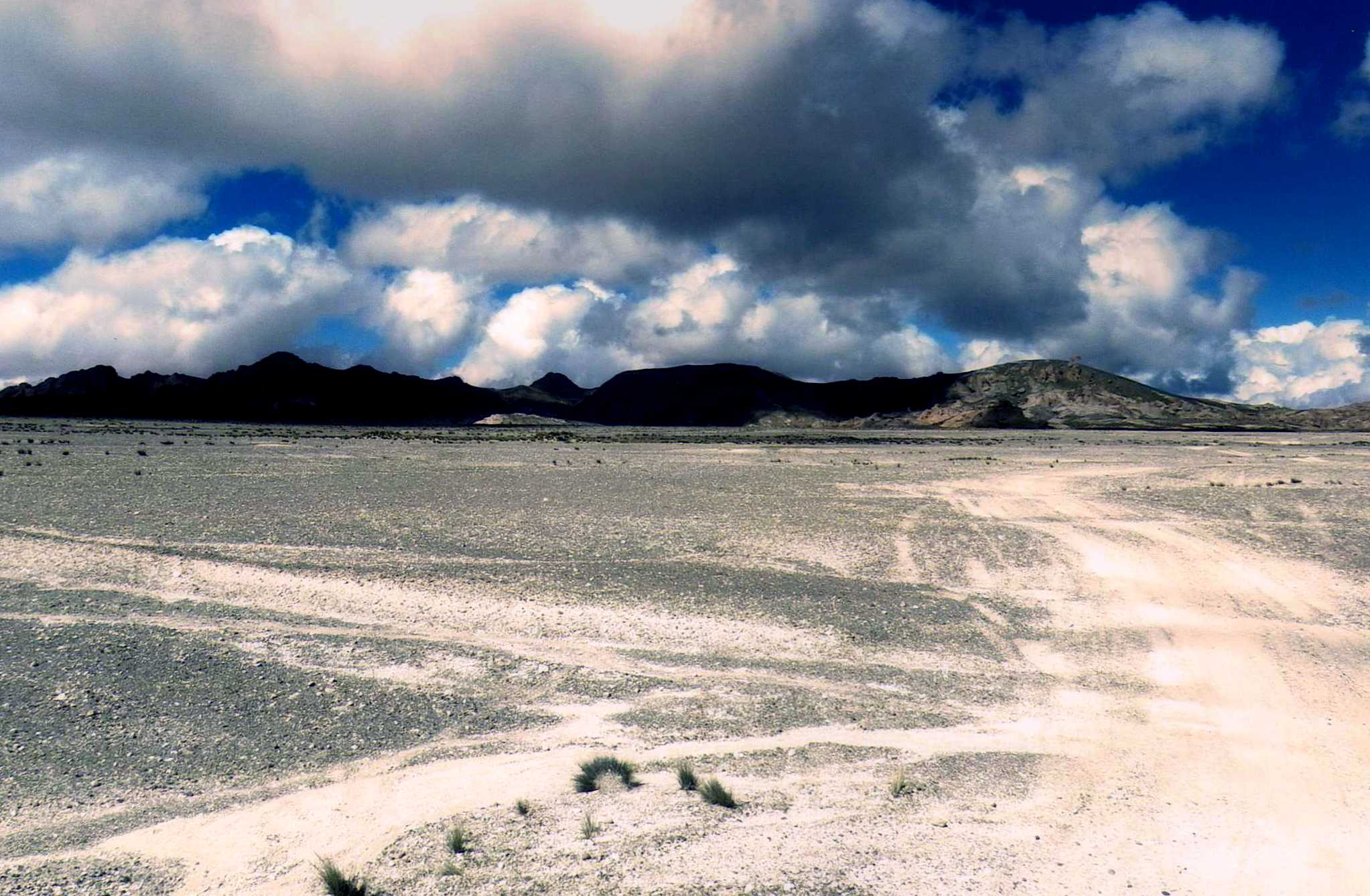 Arenal de Catamarca. Argentina.